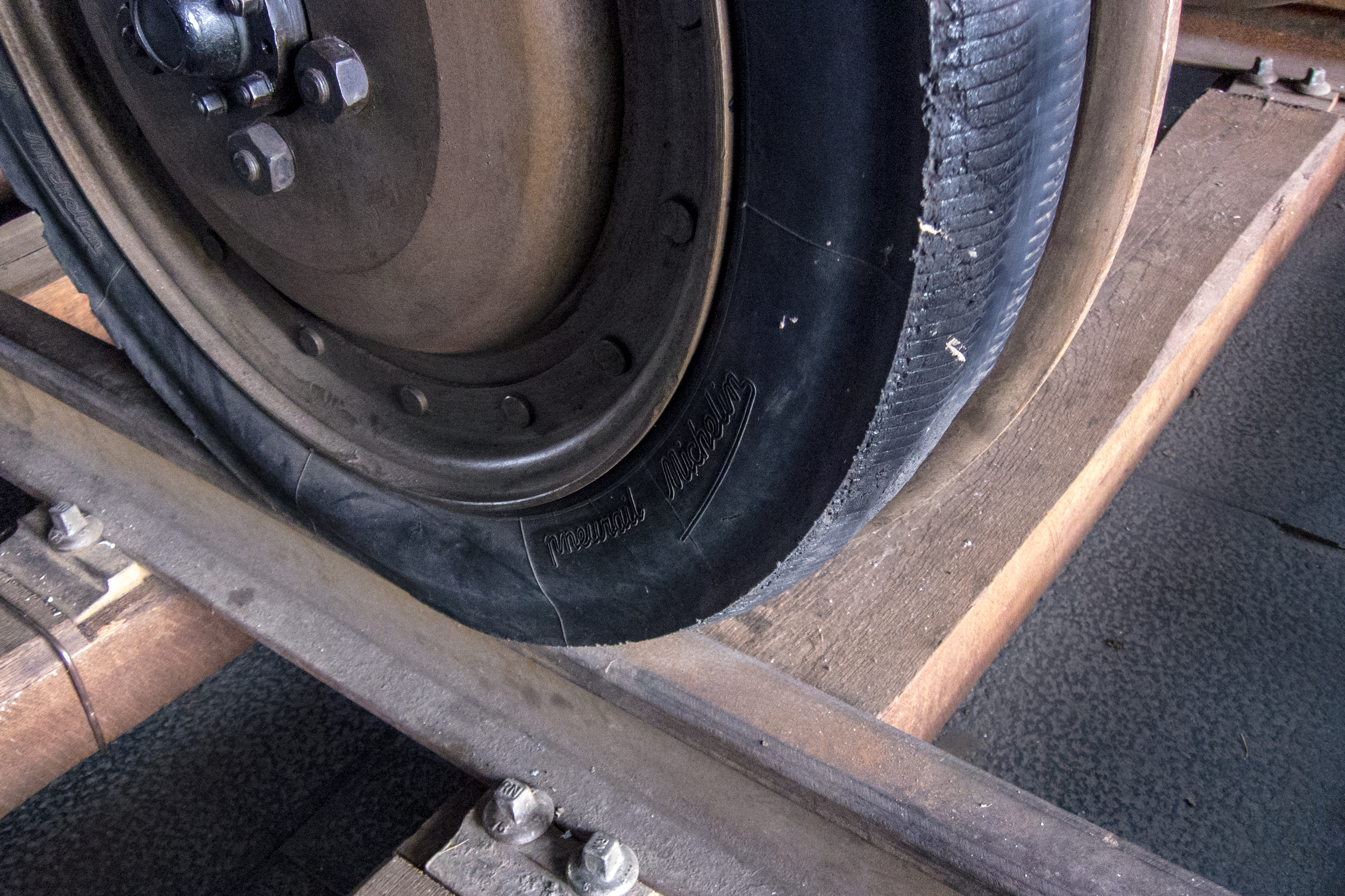 Rueda de goma maciza Michelin "pneural" en un Fargo Power-Wagon WM300 (Dodge. Chrysler Corporation, Estados Unidos, 1957-1958. Transformado Desquenne et Giral, Francia) Expuesto en el Museo del Ferrocarril, Madrid.